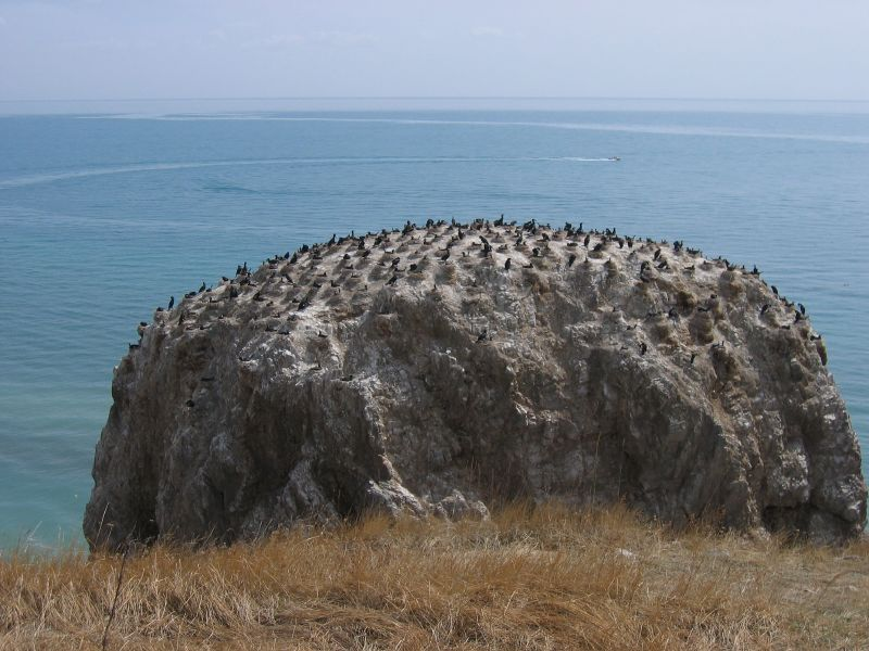 Bird Island, Qinghai Lake.